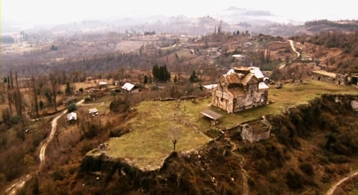 Бедийский собор